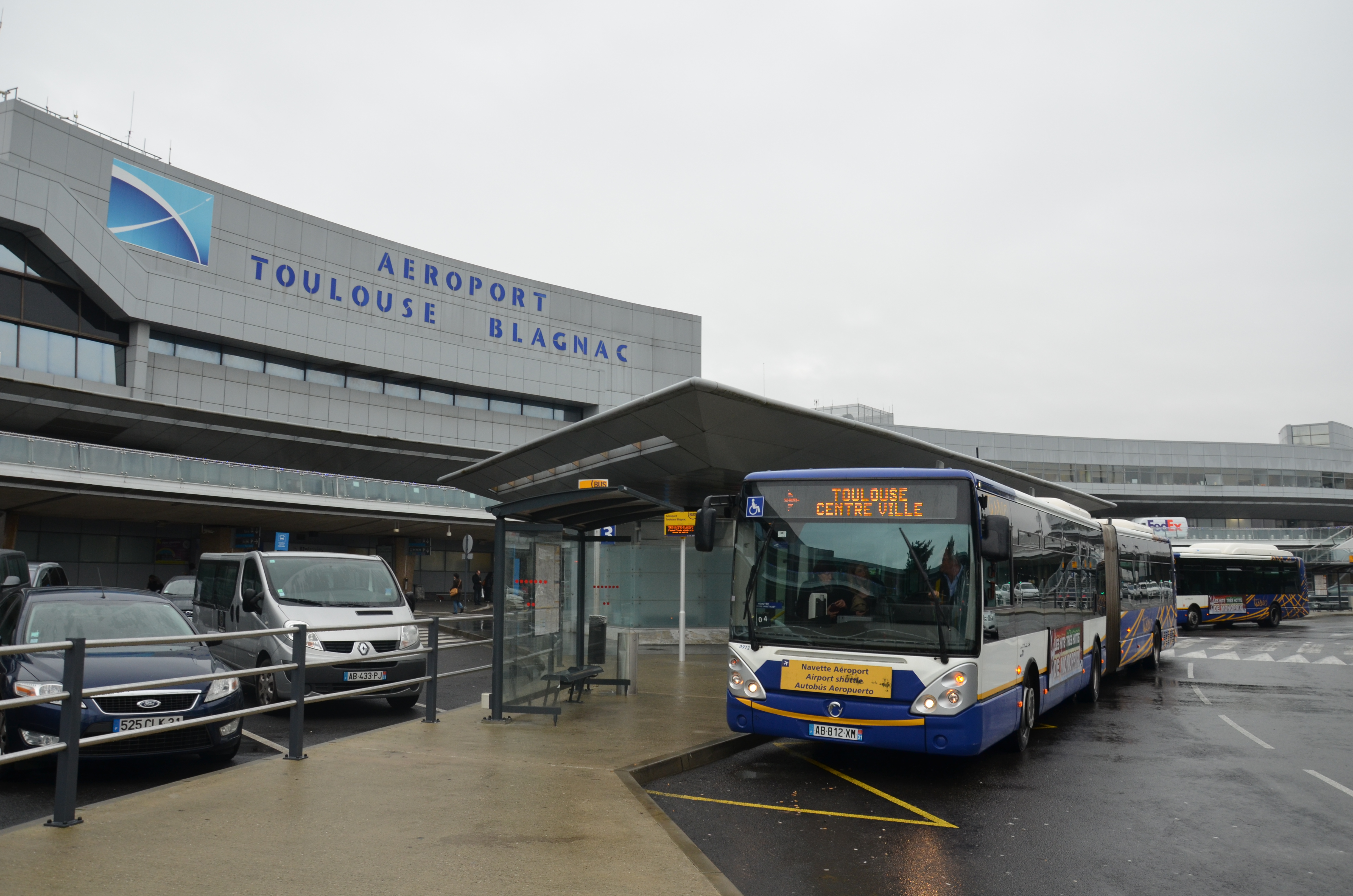 Irisbus Citelis 18 n°0972 sur la navette aéroport TISSEO, à l'Aéroport Toulouse Blagnac.